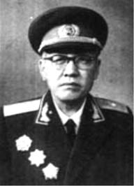 中文（中国大陆）: 贺晋年少将1955年授衔照